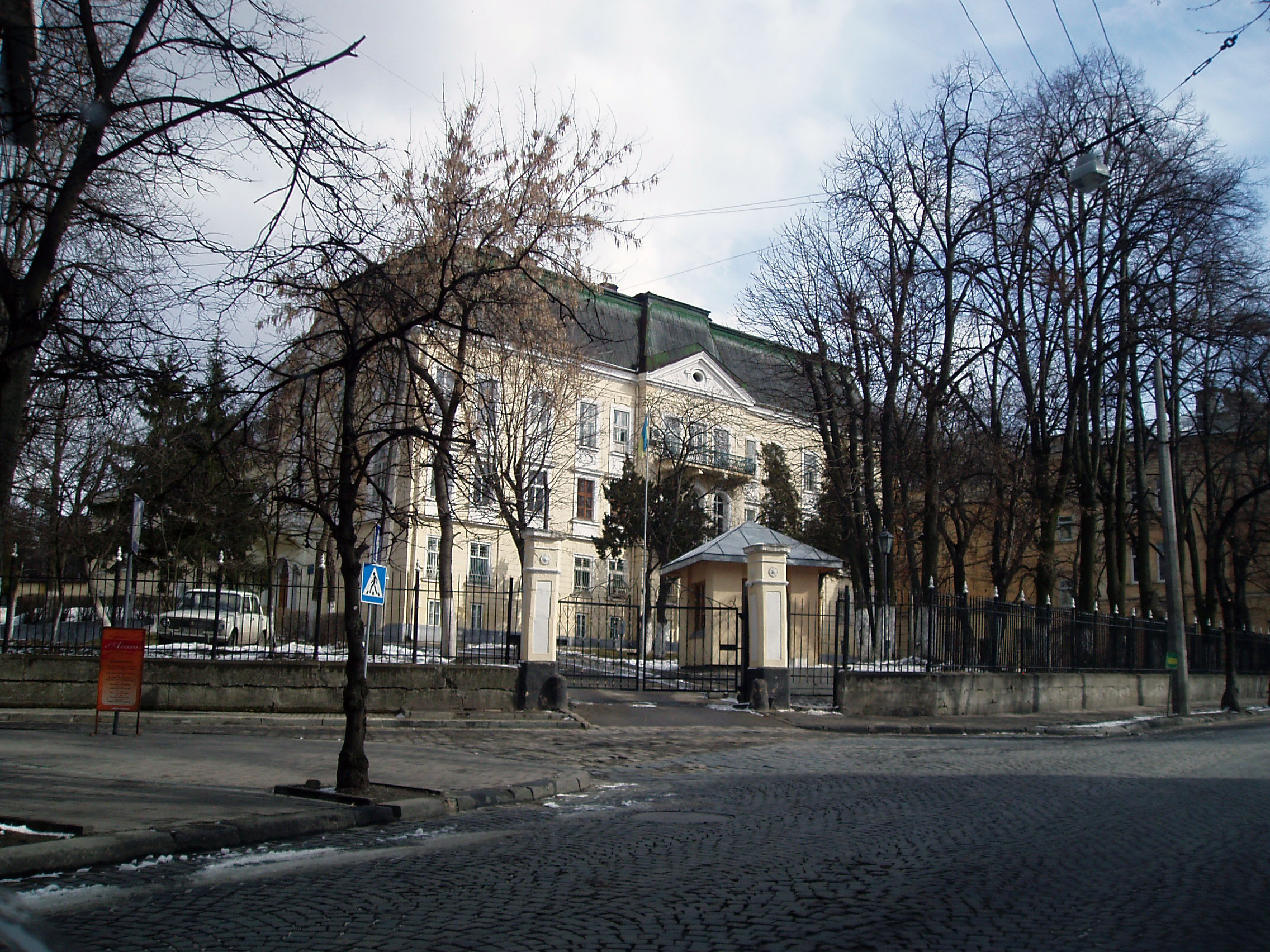 Палац Дідушицьких на вулиці Лисенка, 15 у Львові. Перебудований у 1871-1873 роках за проектом Йозефа Енґеля, у 1902 році за проектом Владислава Галицького.